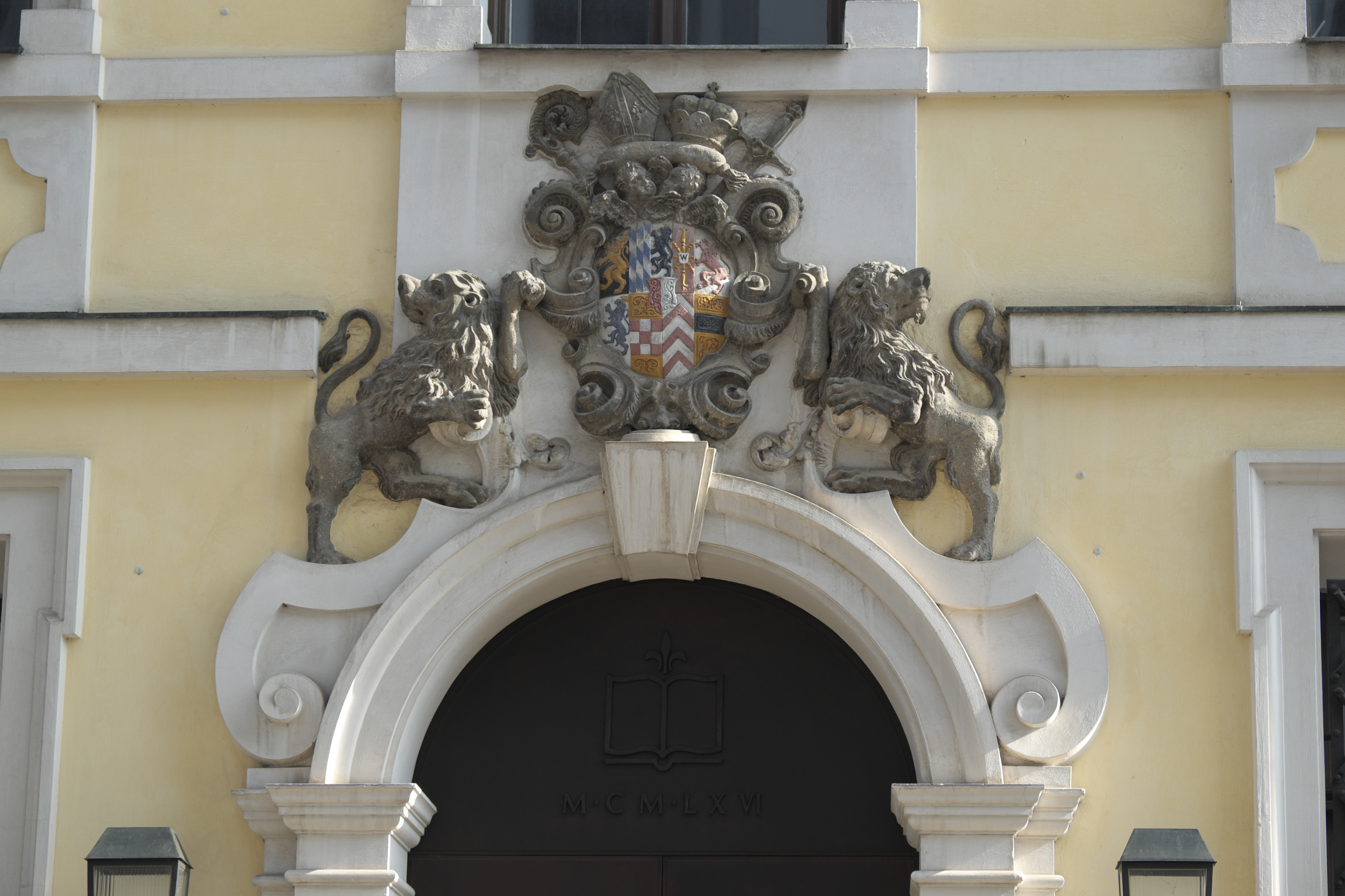 Studienbibliothek, ehemals Gymnasium, in der Kardinal-von-Waldburg-Straße 51 in Dillingen an der Donau (Bayern), Eingang mit Wappen des Augsburger Fürstbischofs Alexander Sigismund von der Pfalz